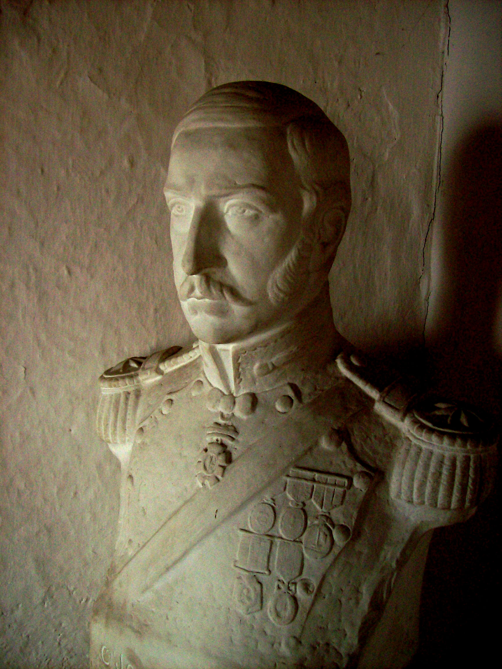 Bust of Coronel José Félix Bogado. San Nicolás, Buenos Aires, Argentina, by sculptor Erminio Blotta (1892-1976).